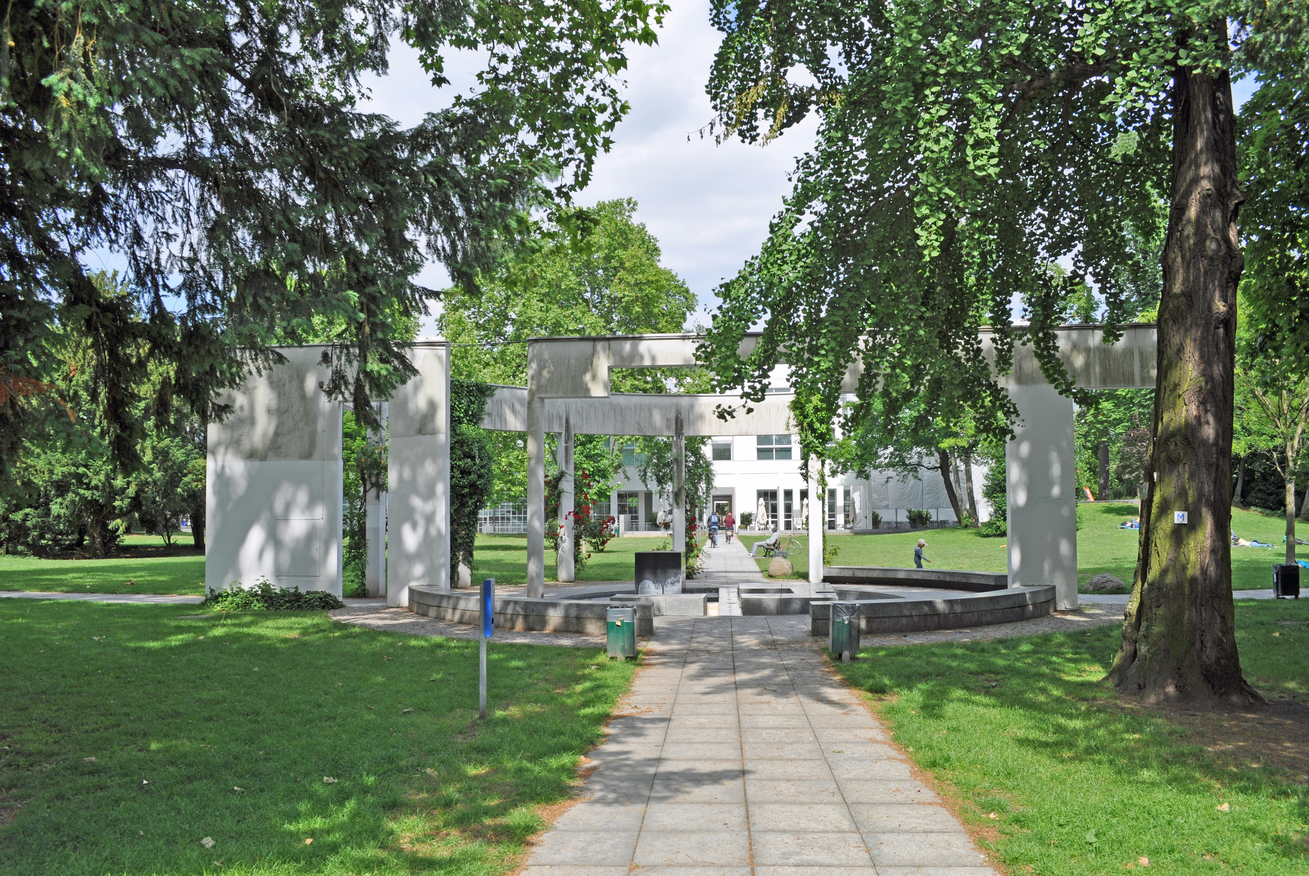 Frankfurt, Brunnen im Museumspark, zwischen dem Museum der Weltkulturen und dem Museum für Angewandte Kunst (im Hintergrund)